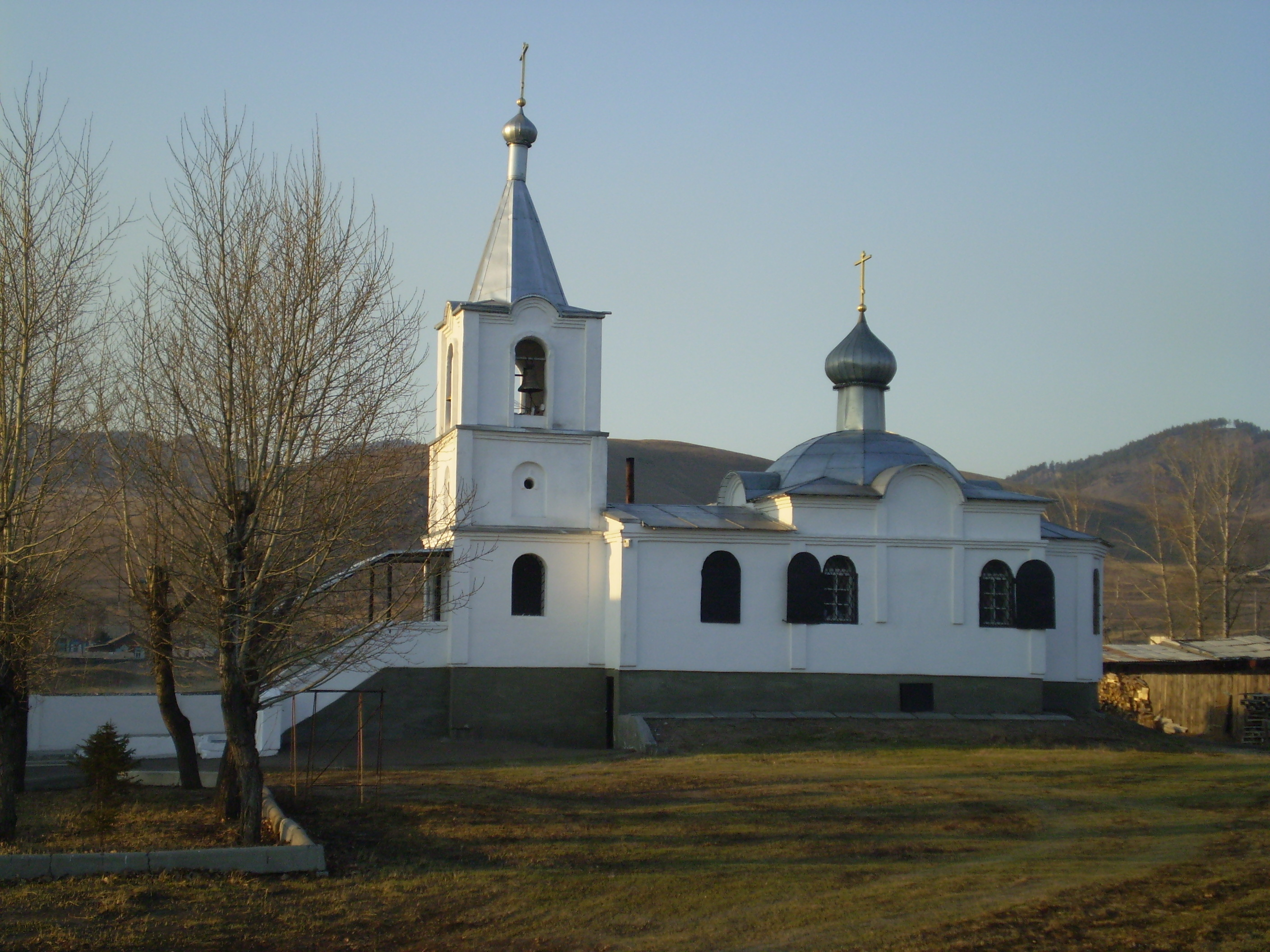 Церковь в селе Тарбагатай